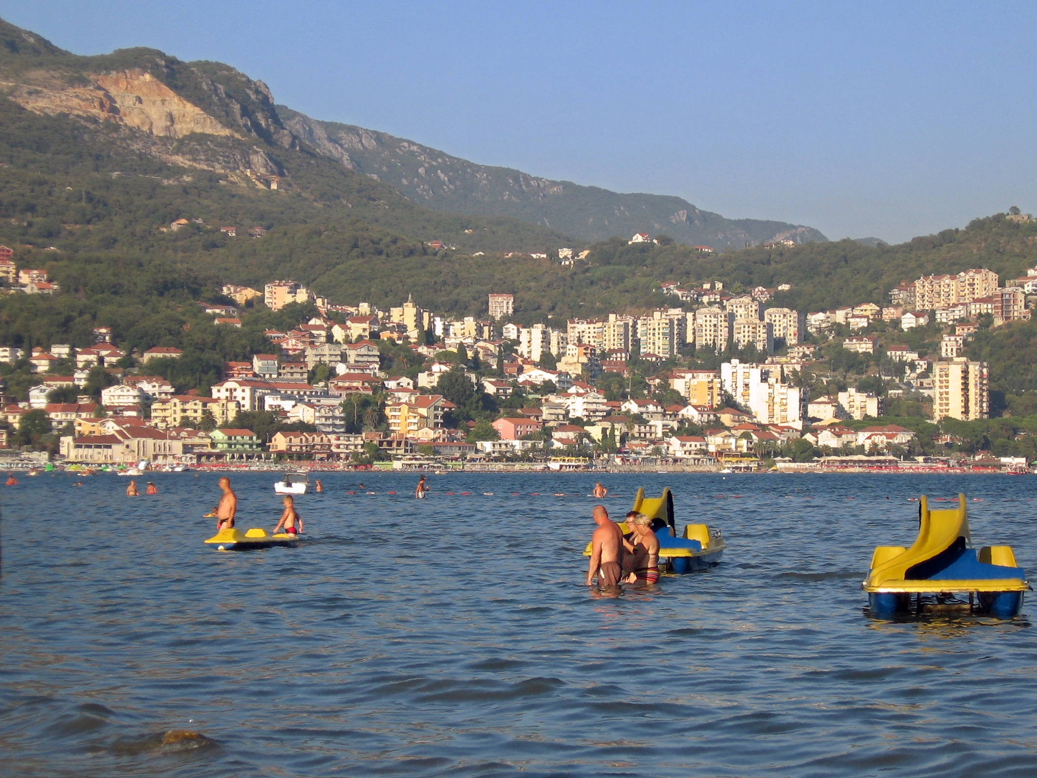 Игало, Черногория